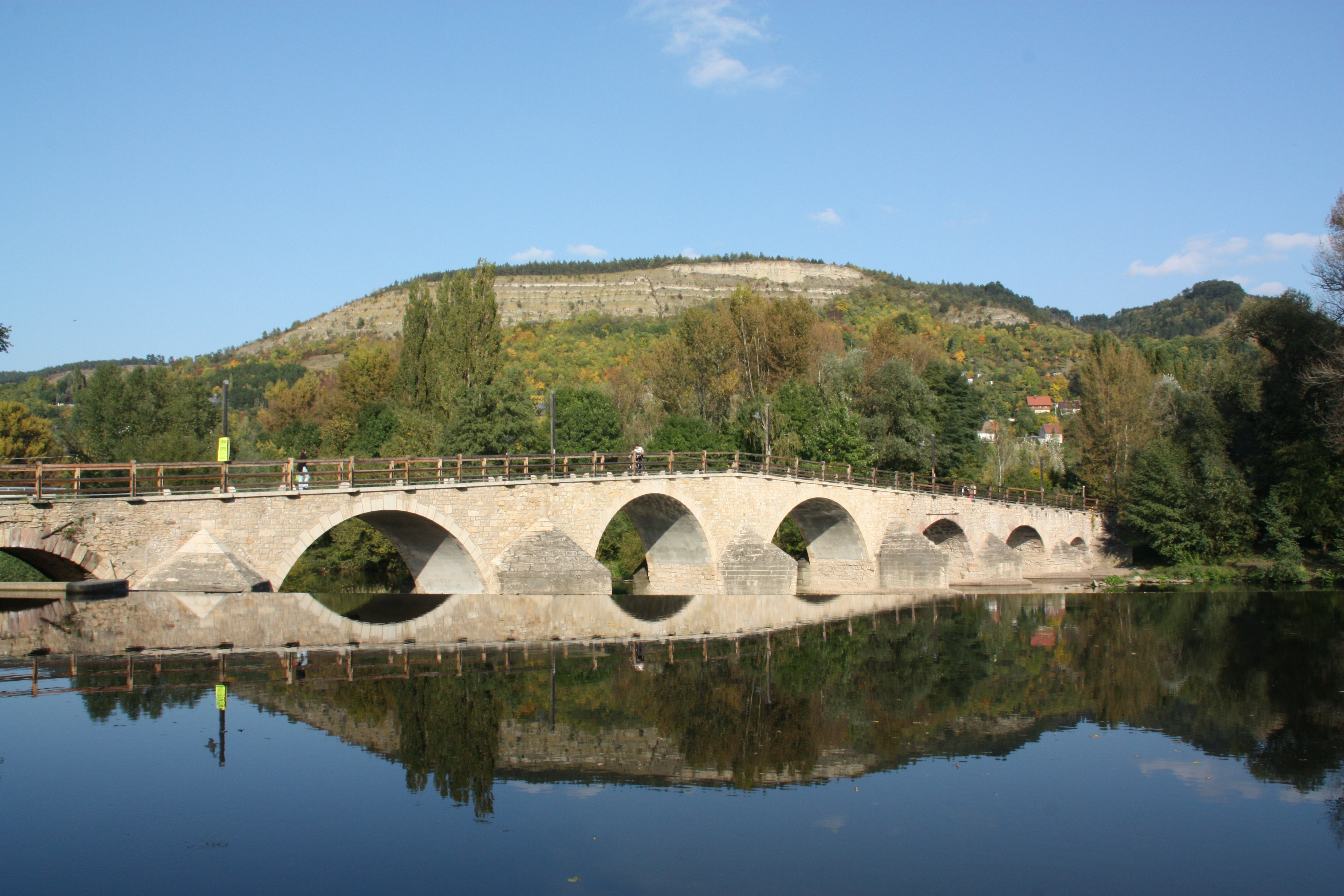 Jena-Lobeda, Johannisberg. Blick von der Burgauer Brücke (von Südwesten).